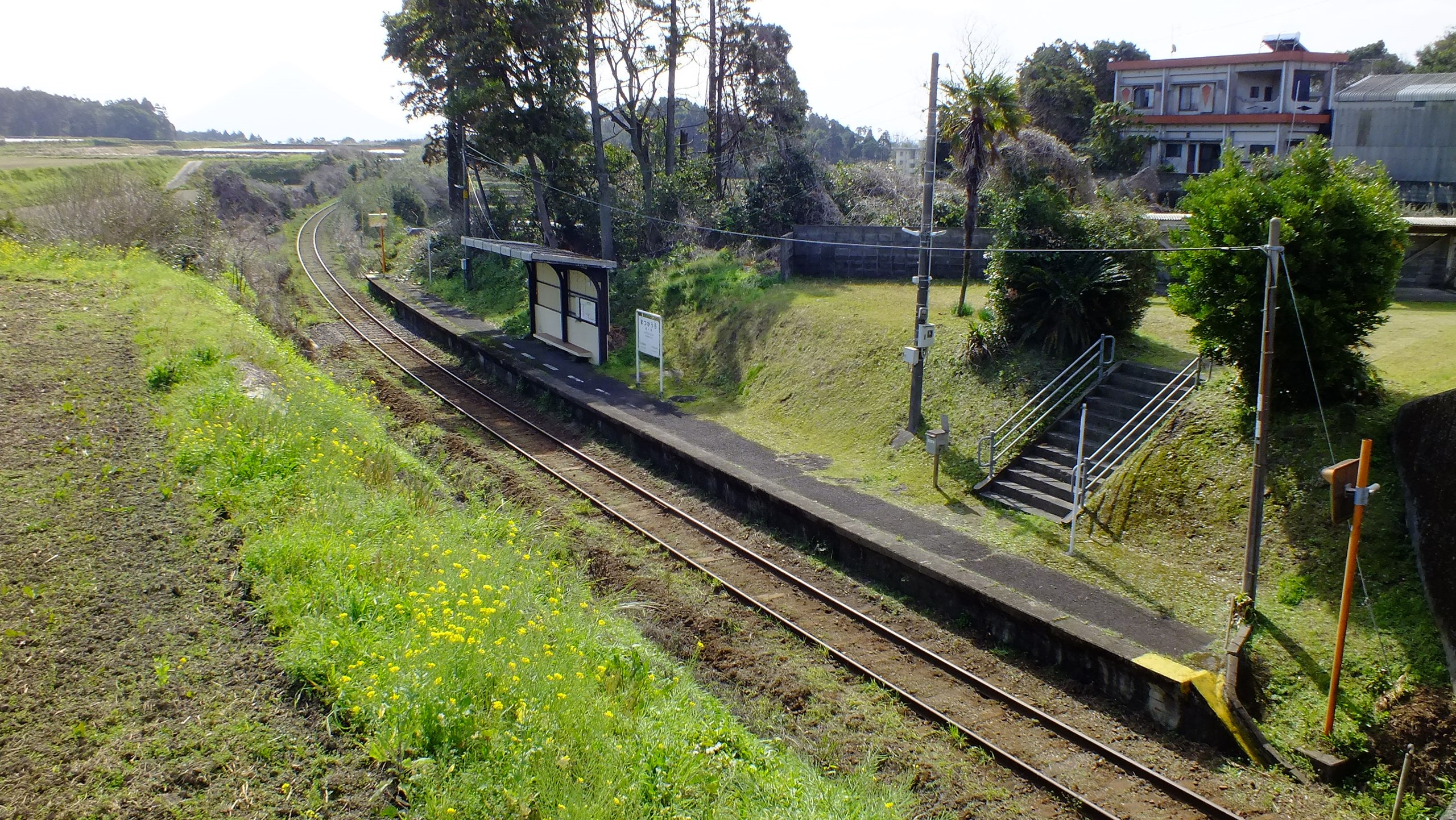 JR指宿枕崎線松ヶ浦駅 鹿児島県南九州市 2019年3月（公道より撮影）